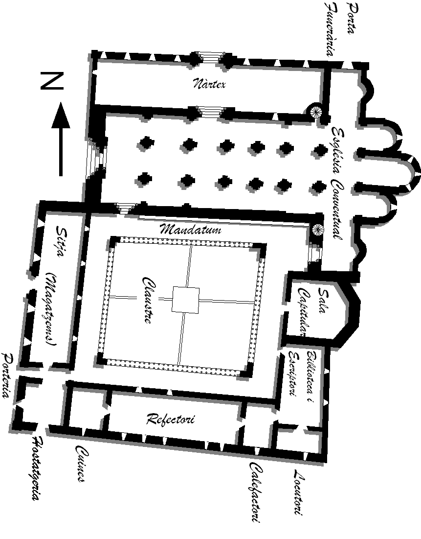 Planta del primitiu monestir de Santo Domingo de Silos, tal com seria en el segle XII. Actualment l'església romànica ha desaparegut, substituïda per una altra més moderna, així com altres estances que rodegen el claustre, (text en català)